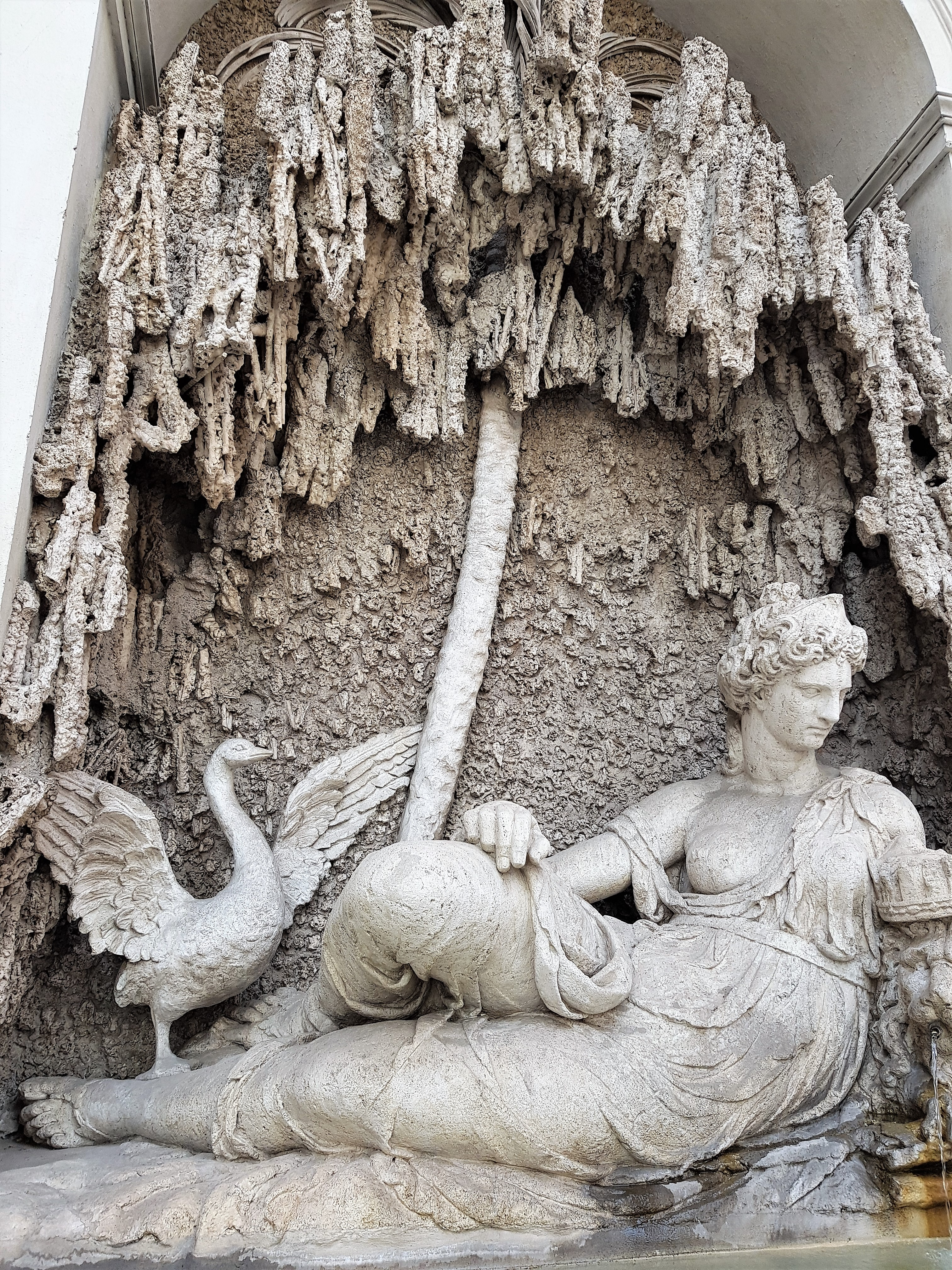 Giunone, una delle quattro fontane.